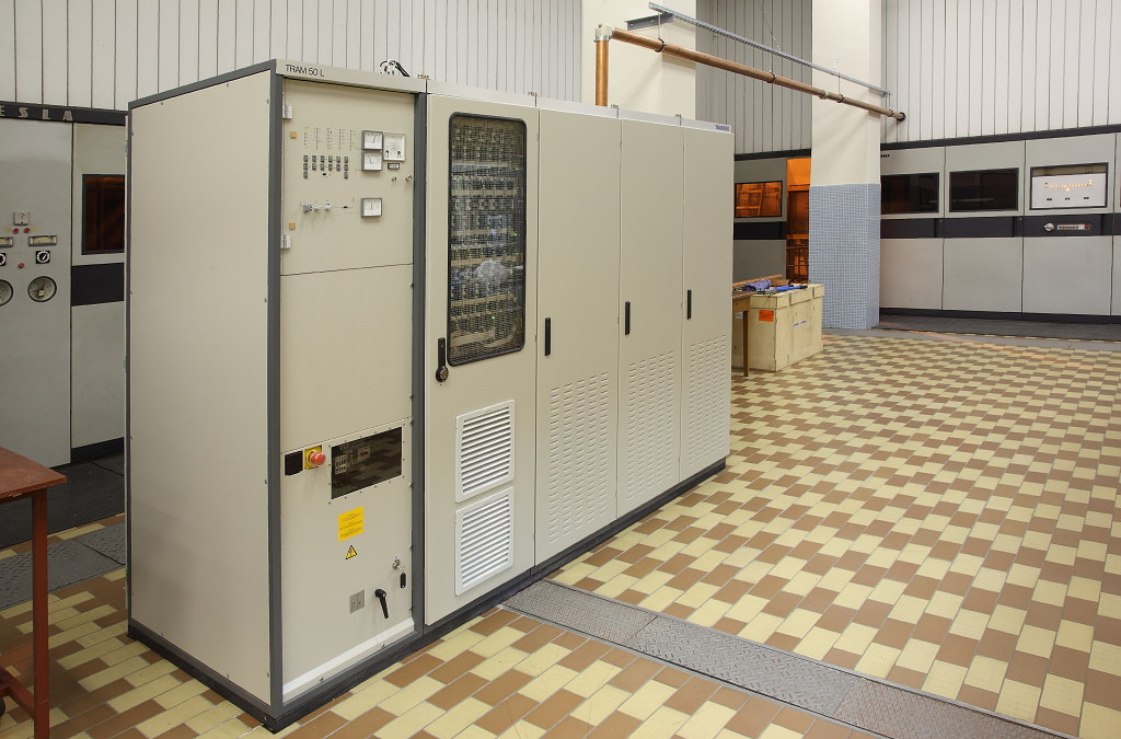 Pět 19" skříní vedle sebe - to je nový vysílač. Ta měděná roura vpravo nahoře je výstupní koaxiál ...